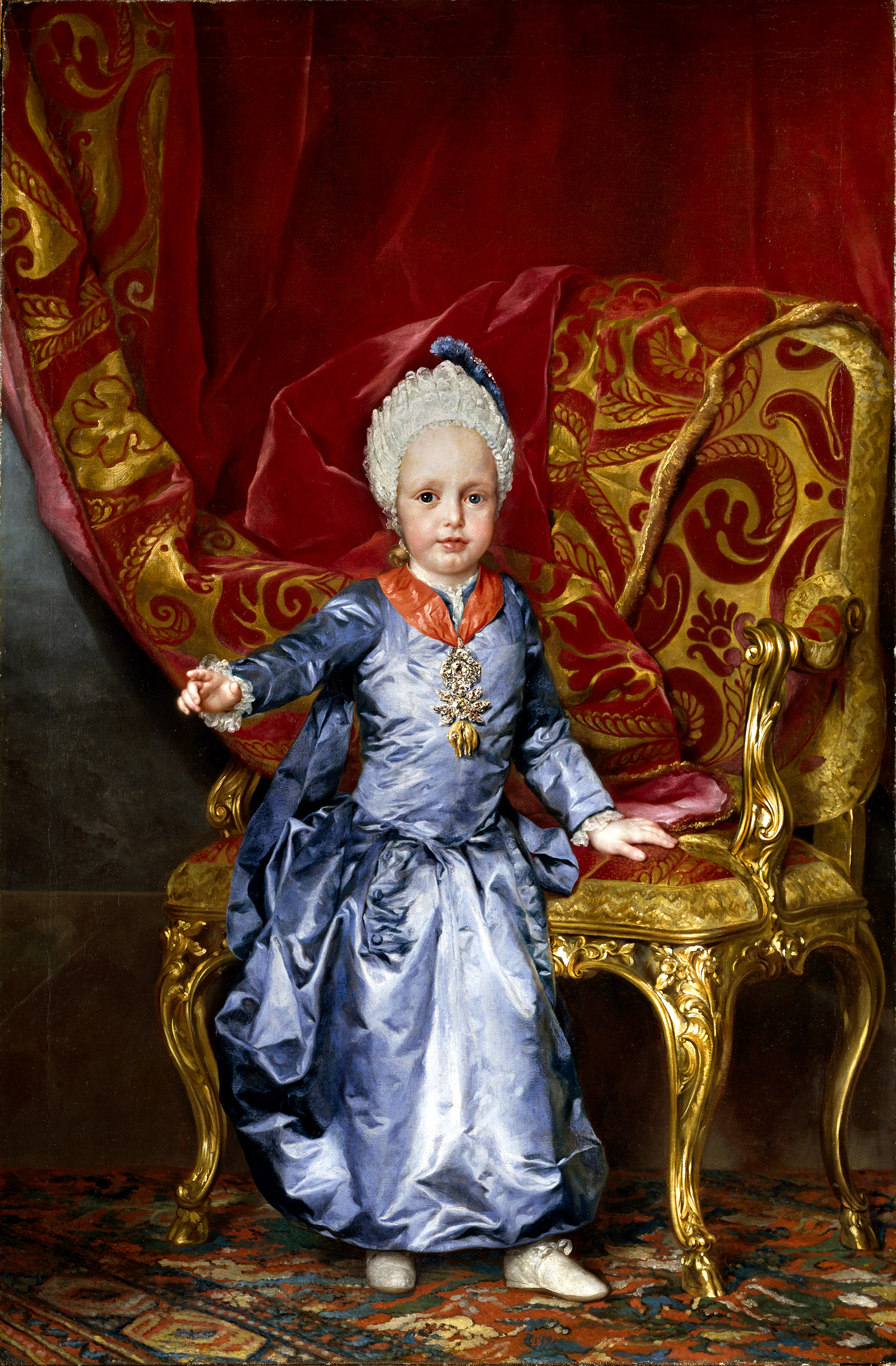 Retrato del archiduque Francisco I de Austria y II del Sacro Imperio Romano Germánico (1768-1835), que llegaría a ser emperador del Sacro Imperio Romano Germánico y también de Austria.